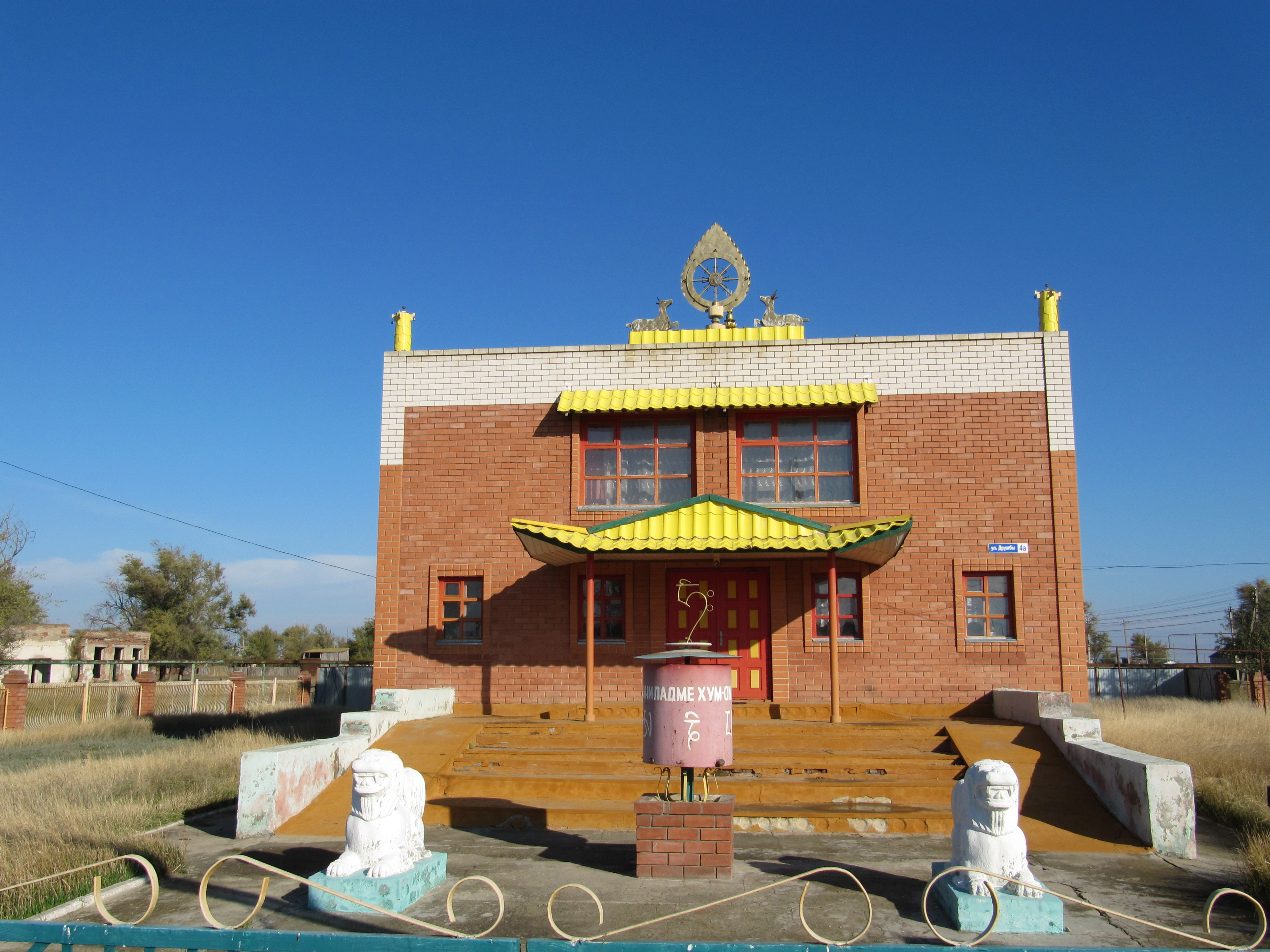 Ульдючиновский хурул, Калмыкия